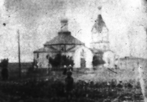 Область Войска Донского, Донецкий округ, хутор Кружилин, Николаевская церковь.